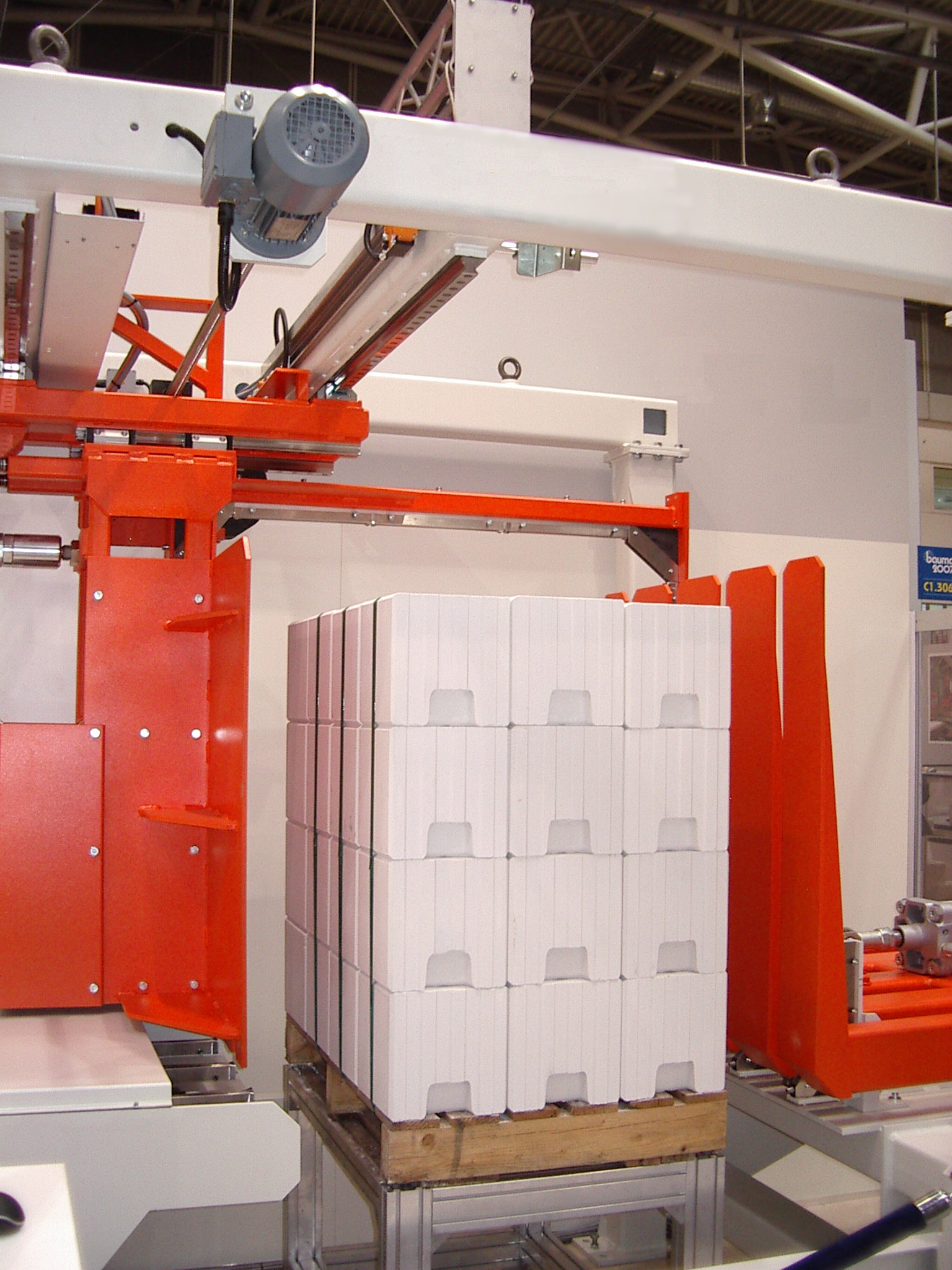 Umreifungsmaschine zum vetikalen Umreifen von Gasbetonsteinen